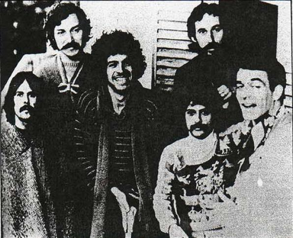 Los Jaivas, banda de rock chileno